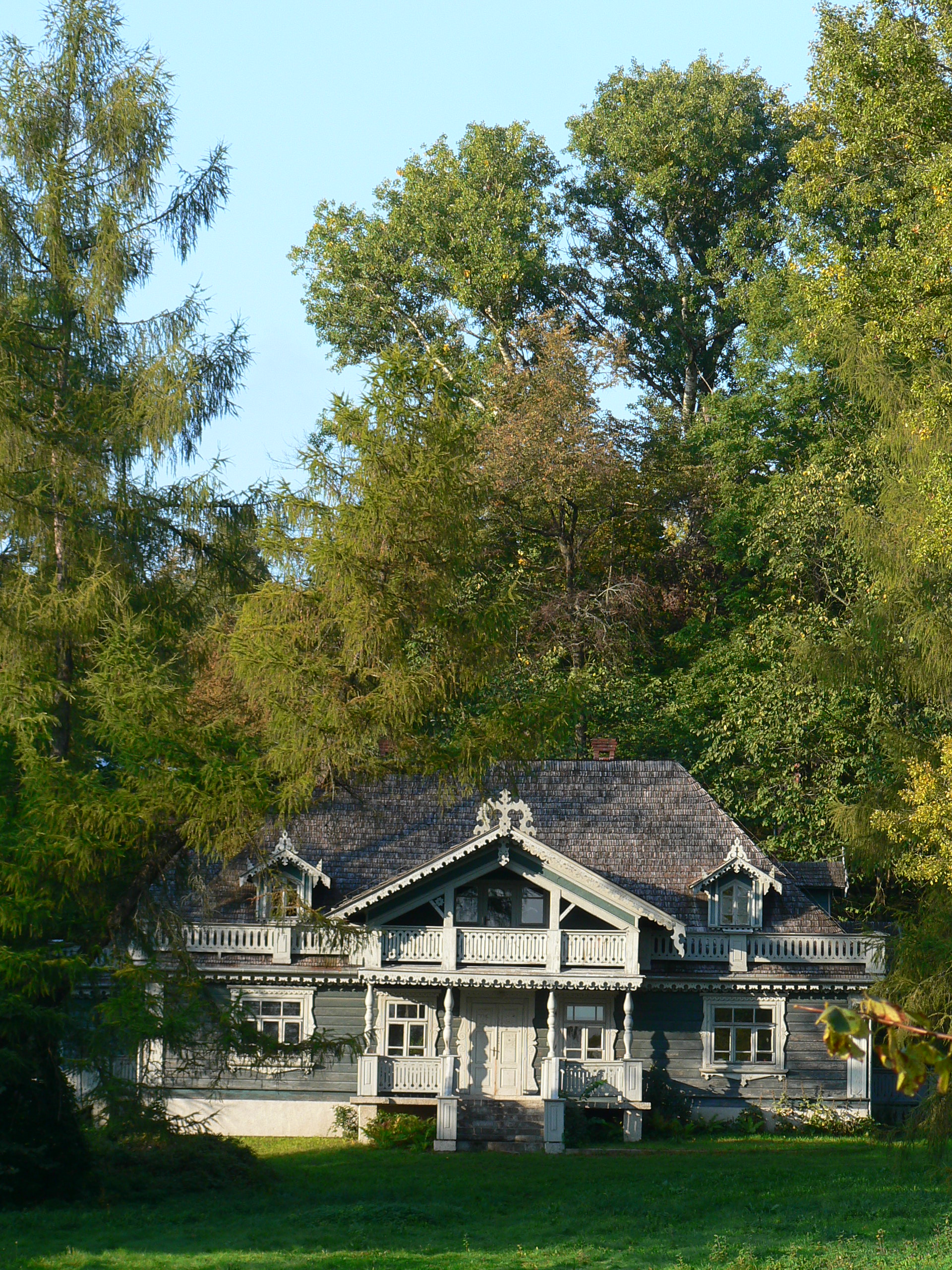 Pałacyk myśliwski w Białowieży